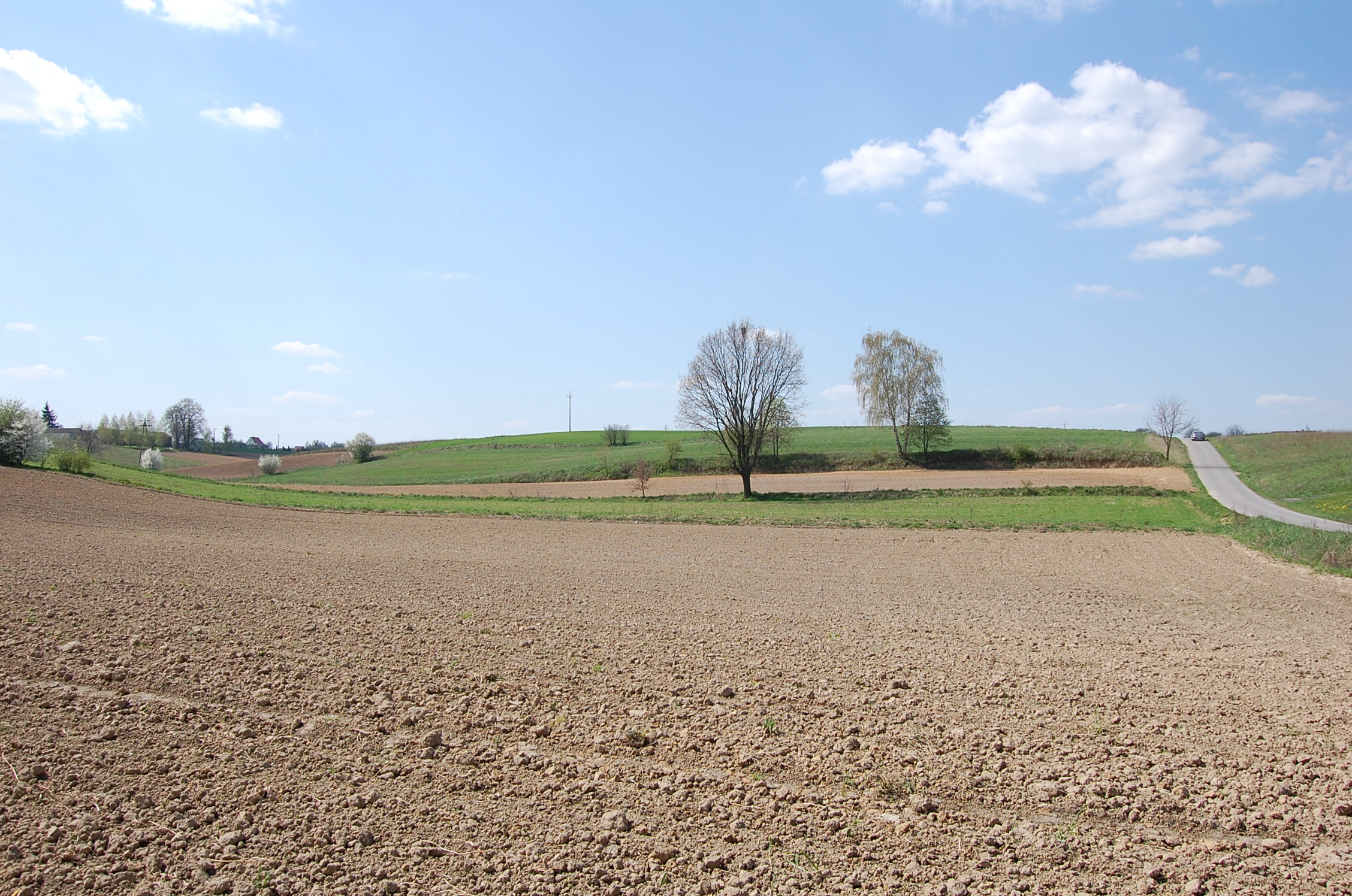 Pola uprawne w Uniszowicach